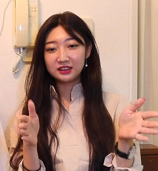 渡邉聖斗のYouTube動画に出演した中村あやの